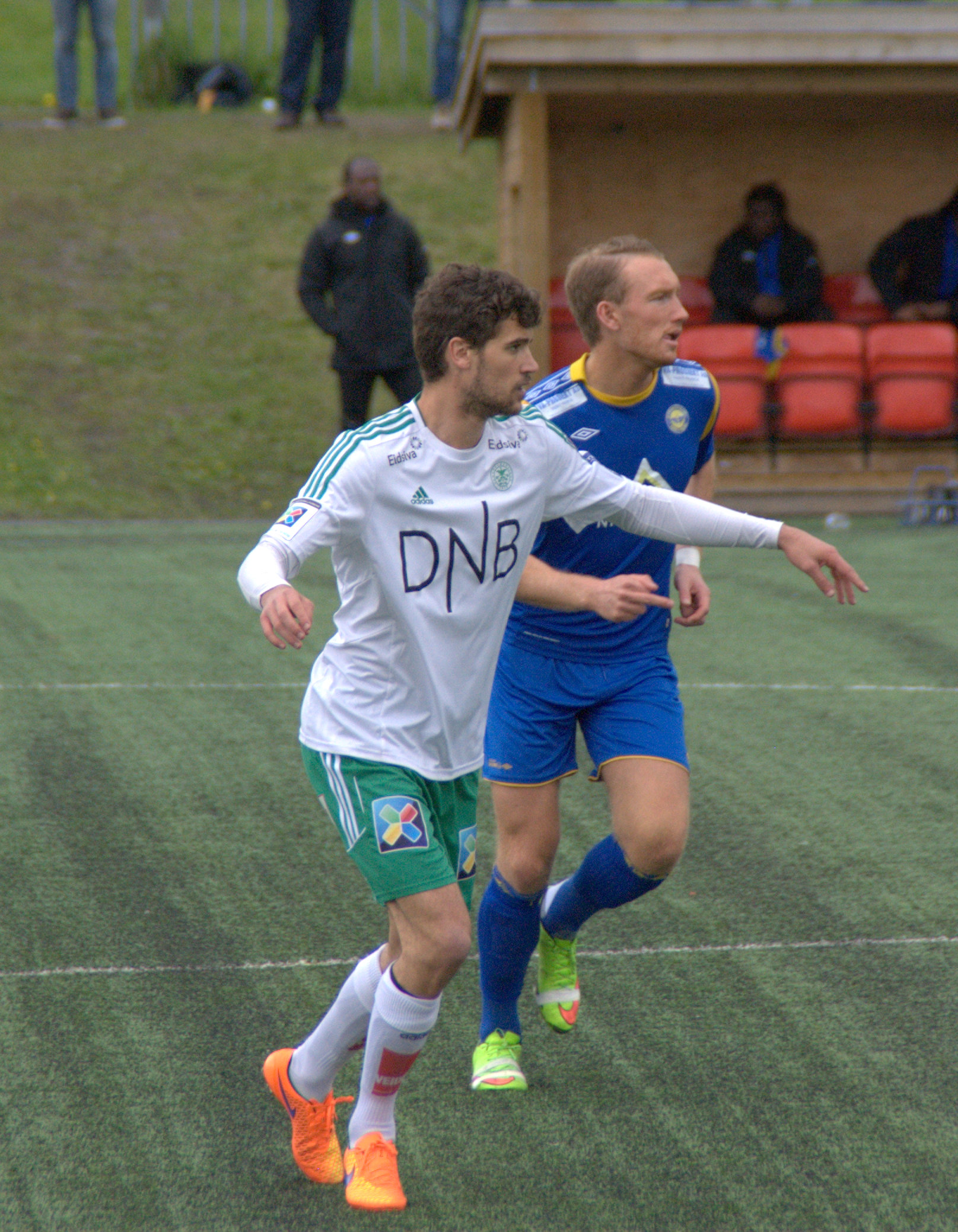 Kristoffer Hagen for Hamarkameratene